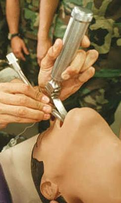 Intubation